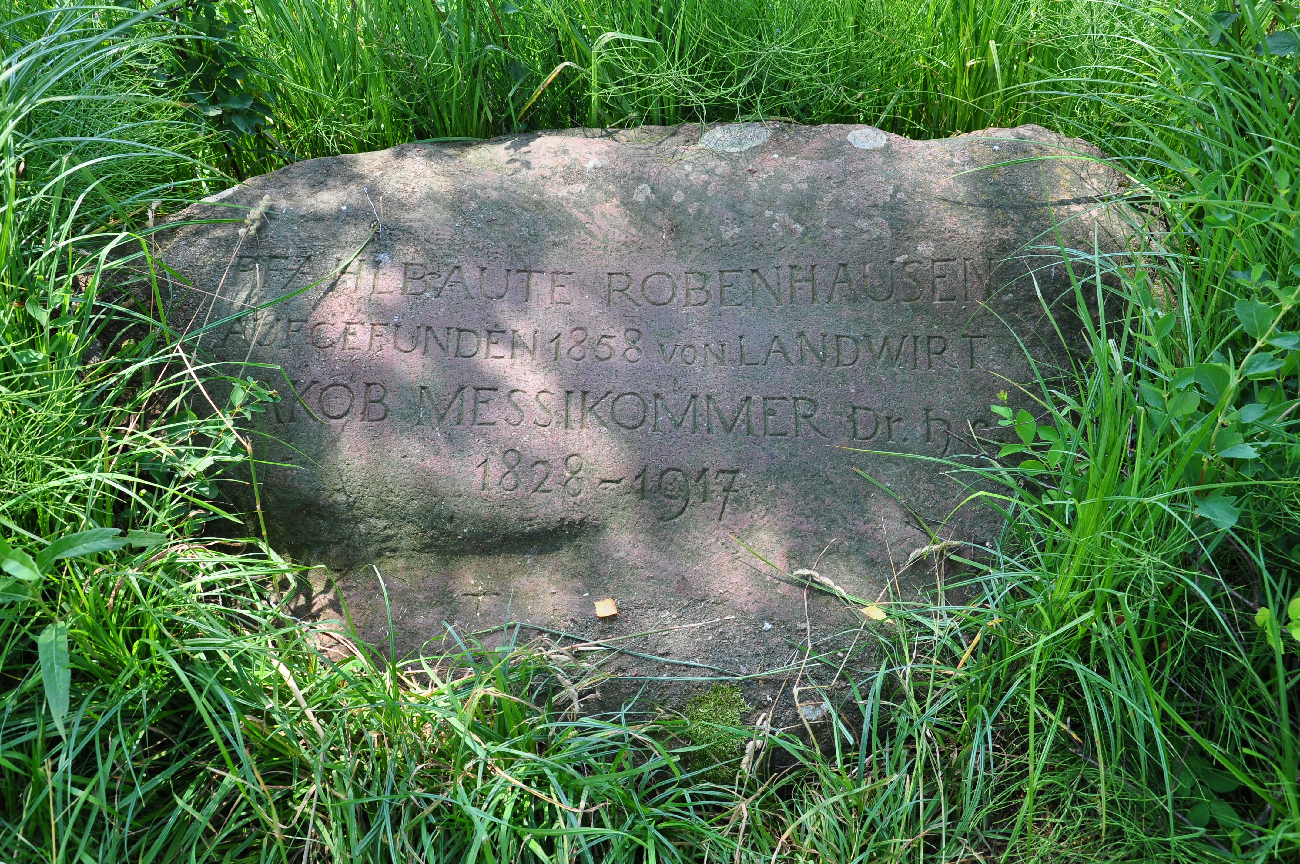 Robenhuserriet in Wetzikon (Switzerland)